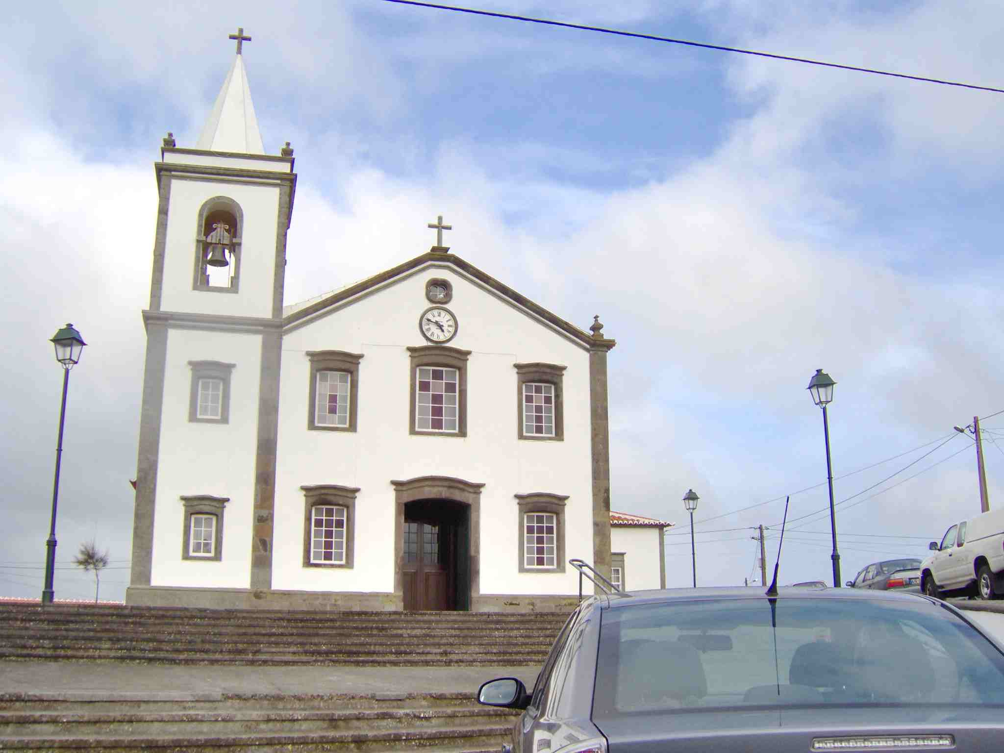 Igreja paroquial da Vila Nova, fachada frontal, ilha Terceira, Açores, Portugal